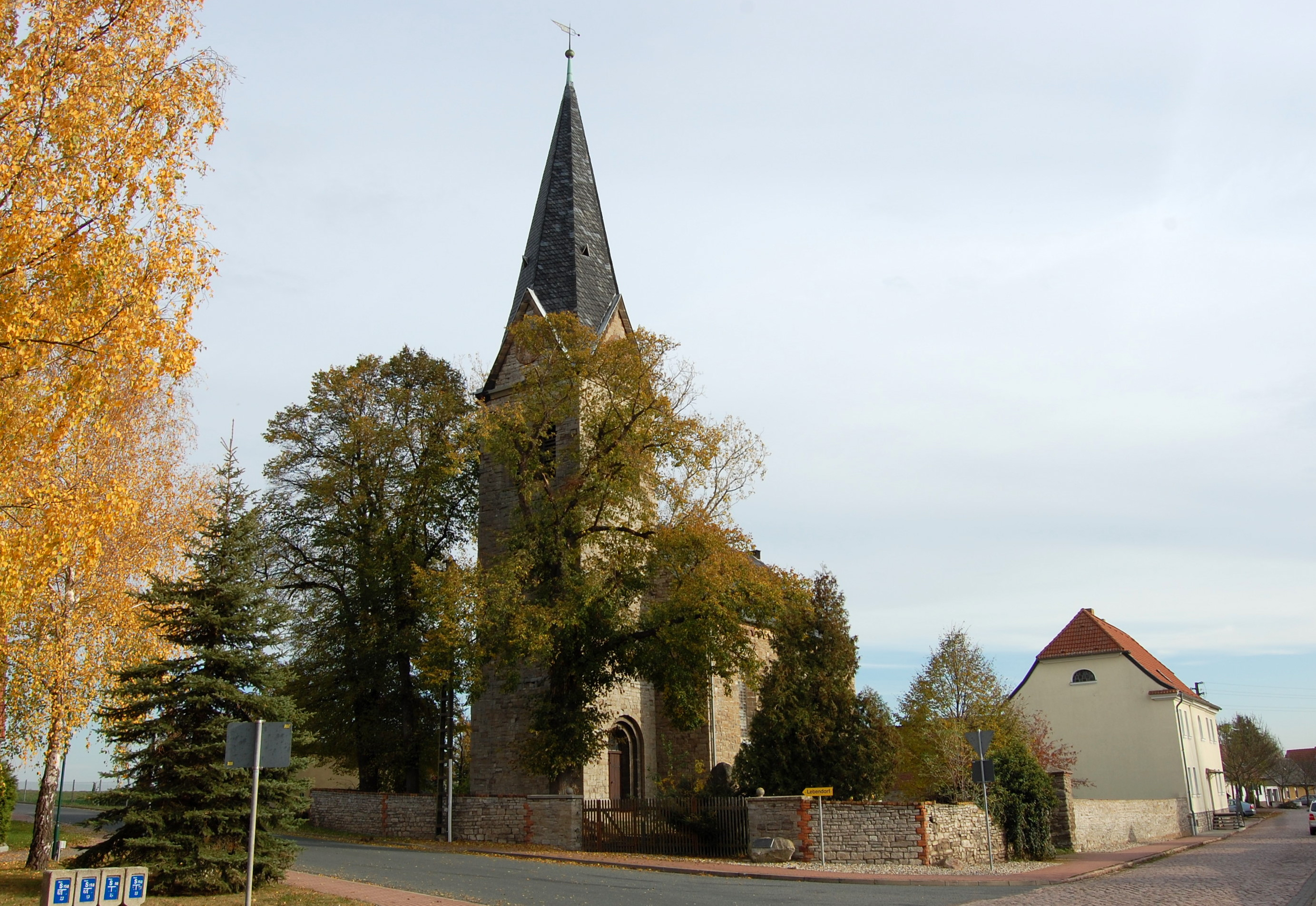 Dorfkirche Trebitz